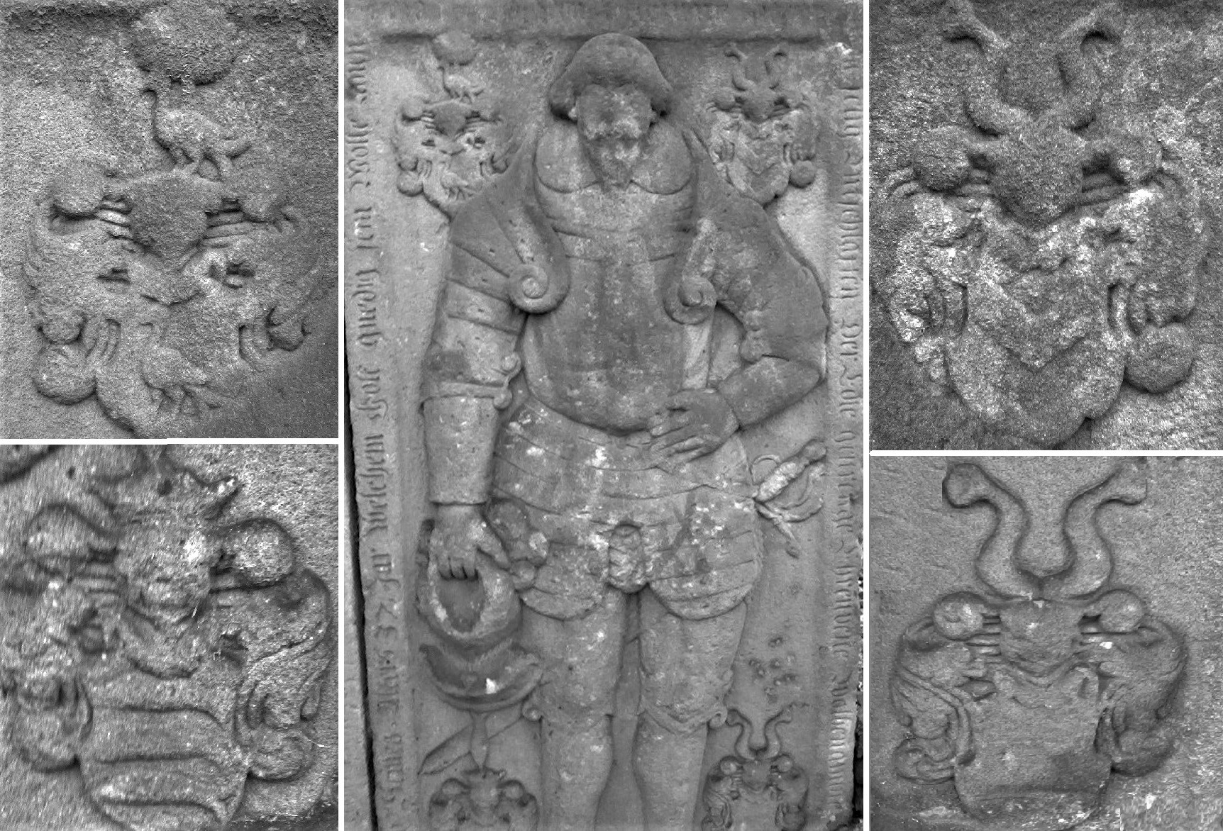 Bożków. Płyta z herbami